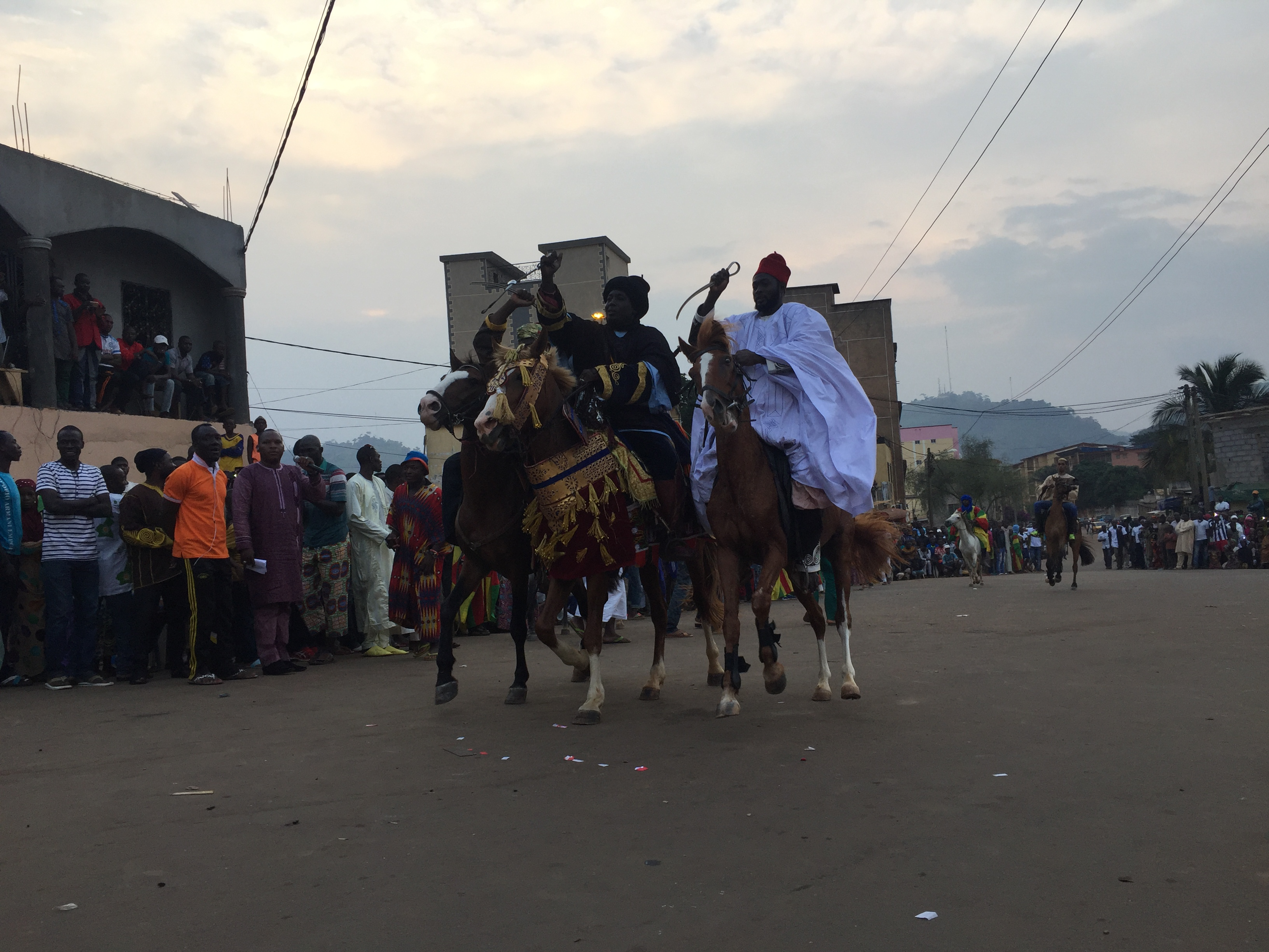 Ceci est une photo de Fantasia lors du festi ramadan Yaoundé 2016. En effet le festi Ramadan est un festival organisée par la communauté Haussa du Cameroun, ce festival a lieu chaque année dans les jours qui suivent la fête de ruptûre de jeûne ou fête de fin du mois de Ramadan . Le lieu du Festival c'est le quartier Briqueterie de Yaoundé au Cameroun. This is an image from Cameroon